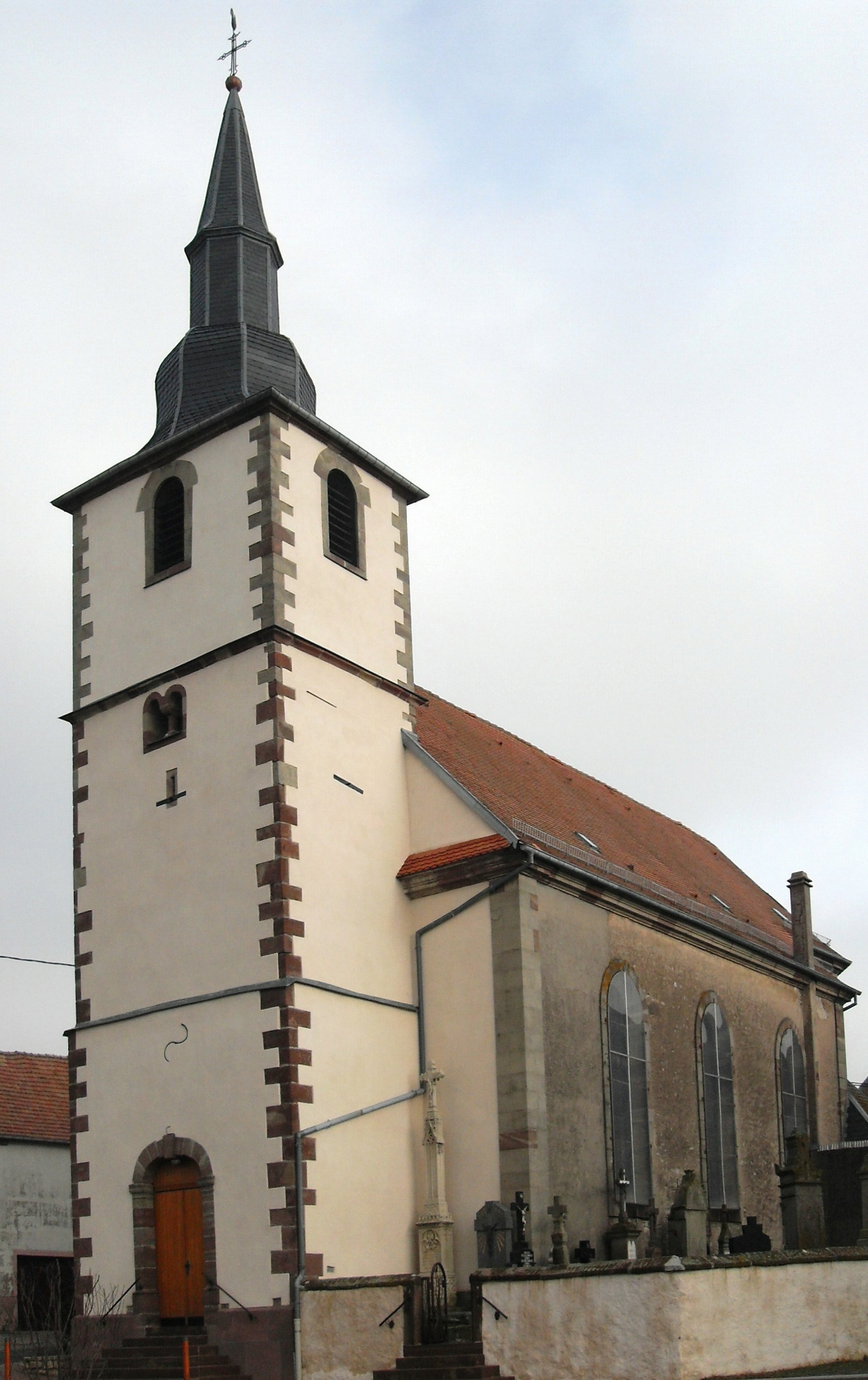 L'église Saint-Denis à Hérange, côté à l'ouest